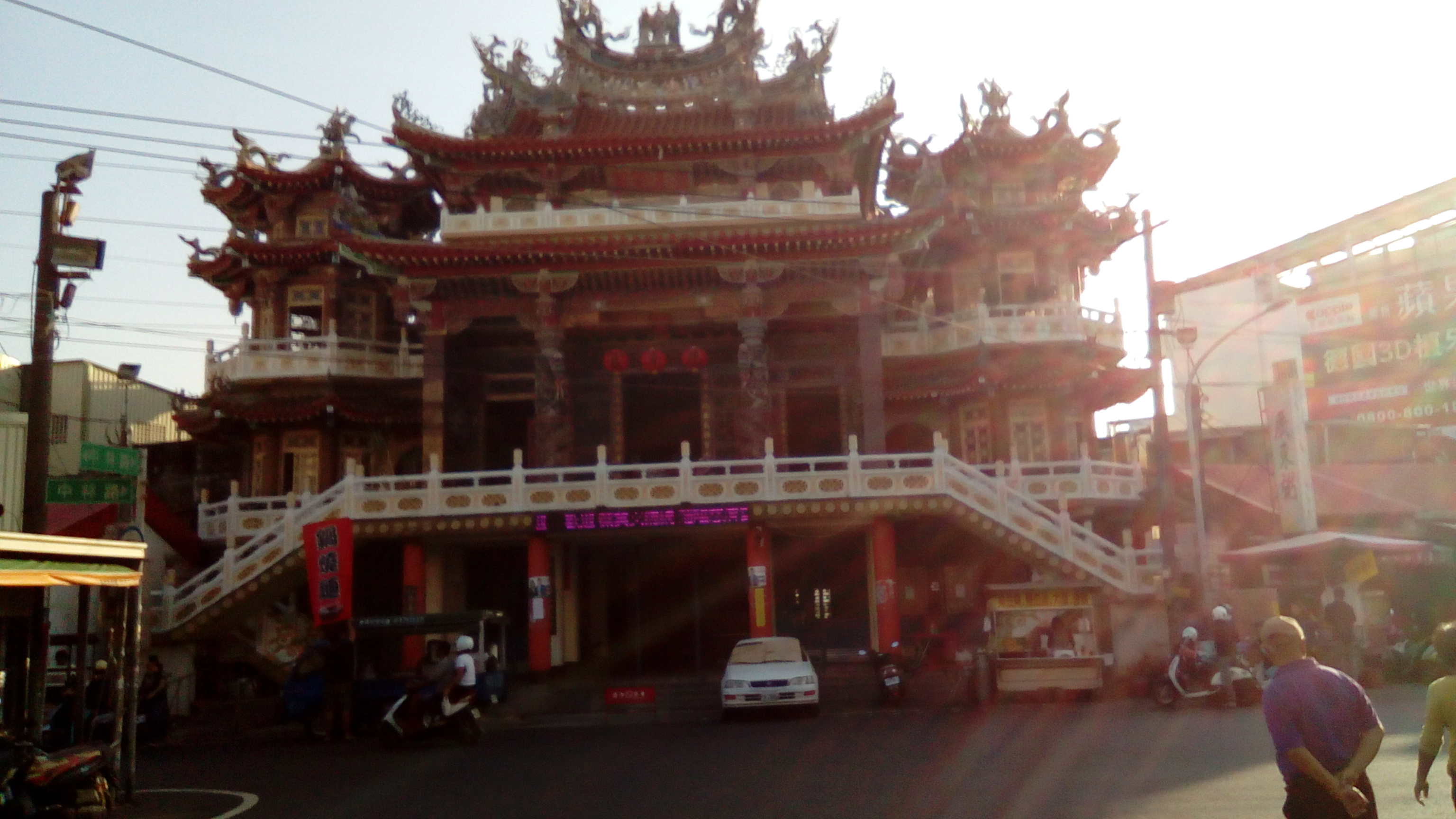 林邊市區